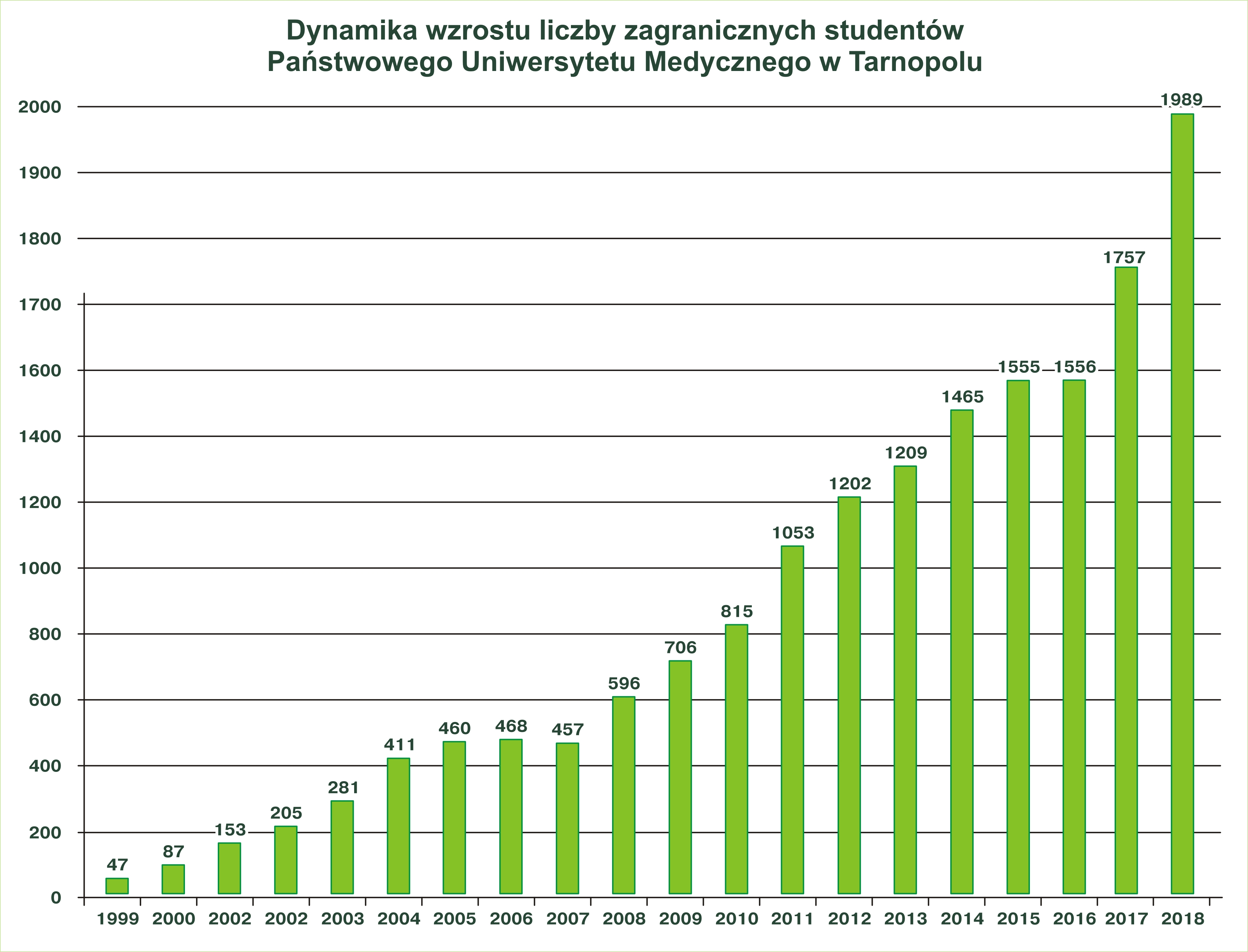 Dynamika wzrostu liczby zagranicznych studentów Państwowego Uniwersytetu Medycznego w Tarnopolu w 1999-2018